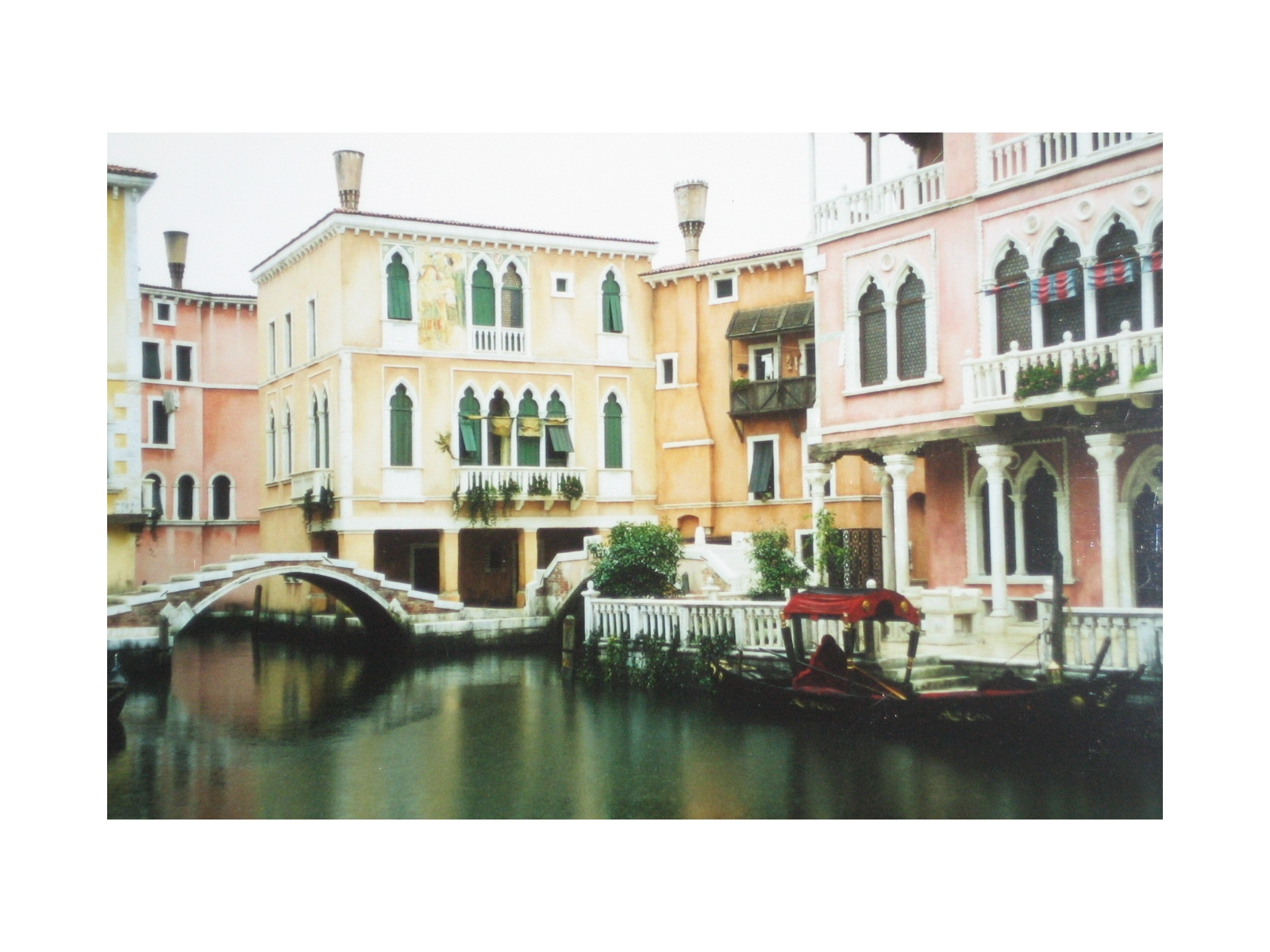 De Filmset vum Film "Secret Passage", deen am Venedeg vum 15./16. Joerhonnert spillt. De Set war 2001 zu Esch-Uelzecht op der Industriefriche vun Terre Rouge opgeriicht ginn. D'Foto ass bei enger Porte ouverte, den 22. September 2001, gemaach ginn.